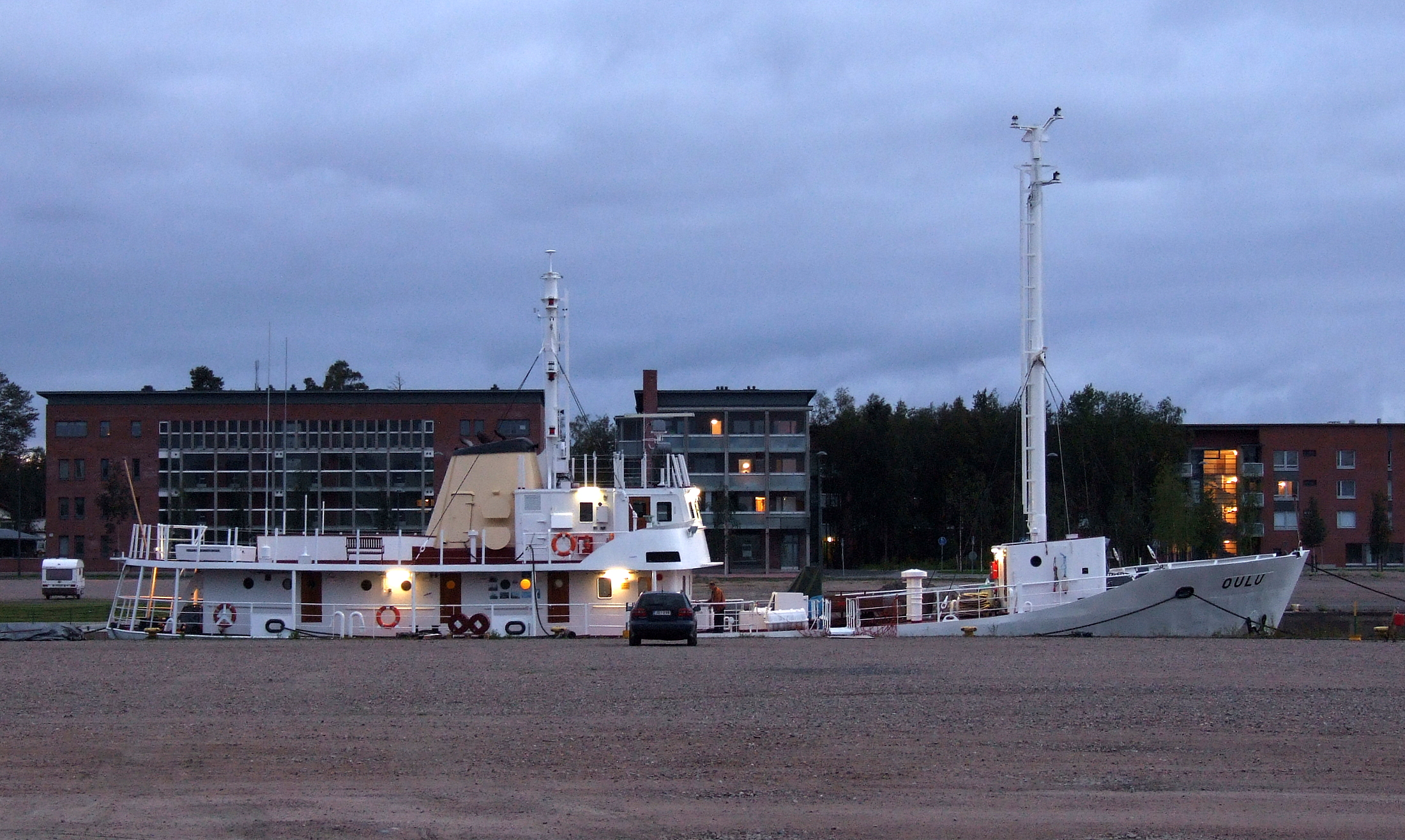 MS Oulu in Toppila harbour, Oulu.